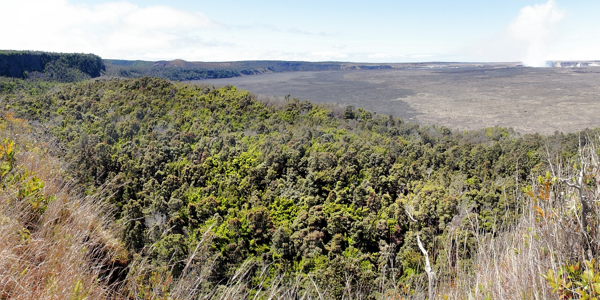 Иллюcтрация для викиуебника Гавайеведение